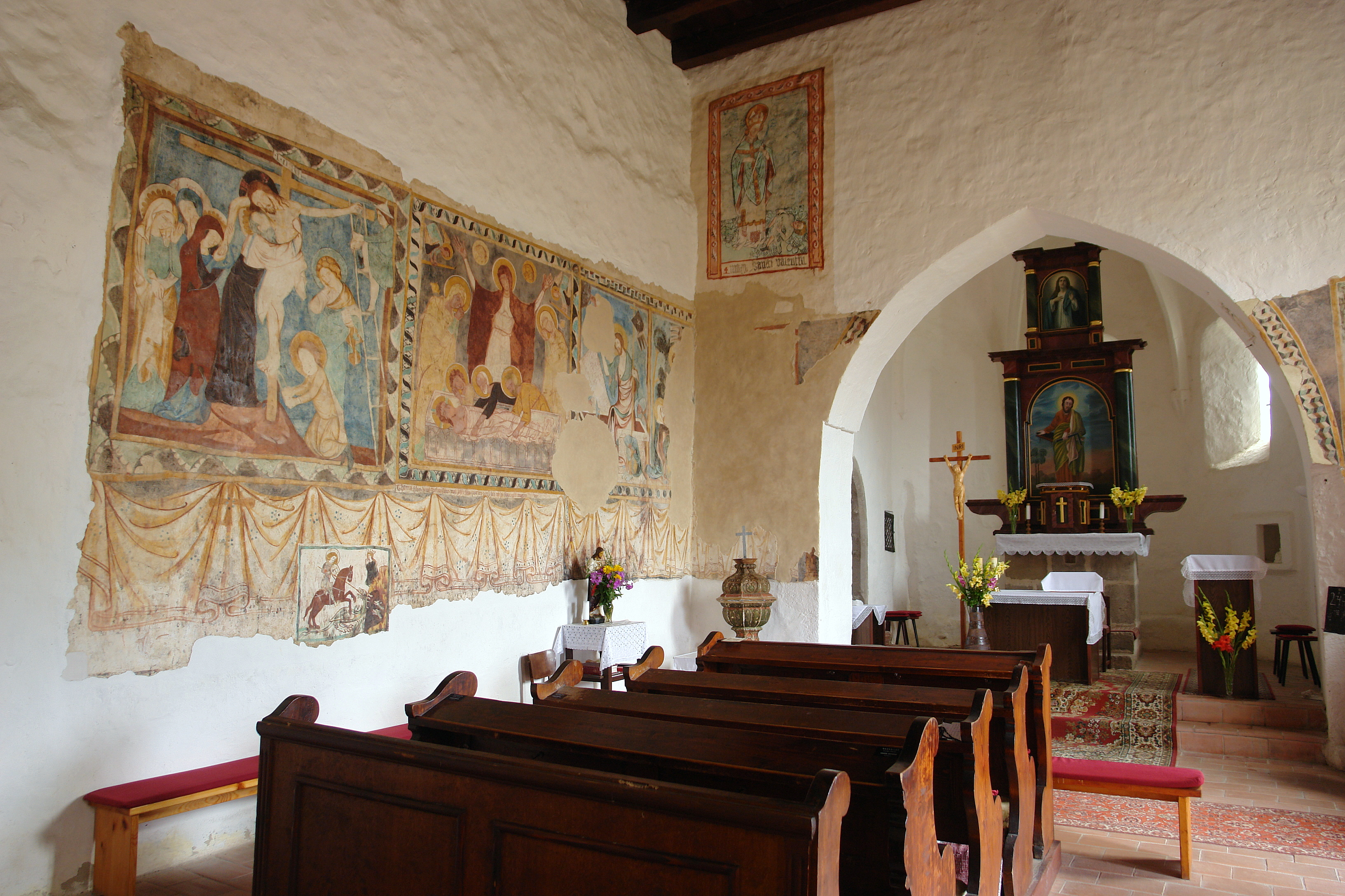 Szent Mátyás apostol tiszteletére szentelt kora gótikus templom, Zolna.